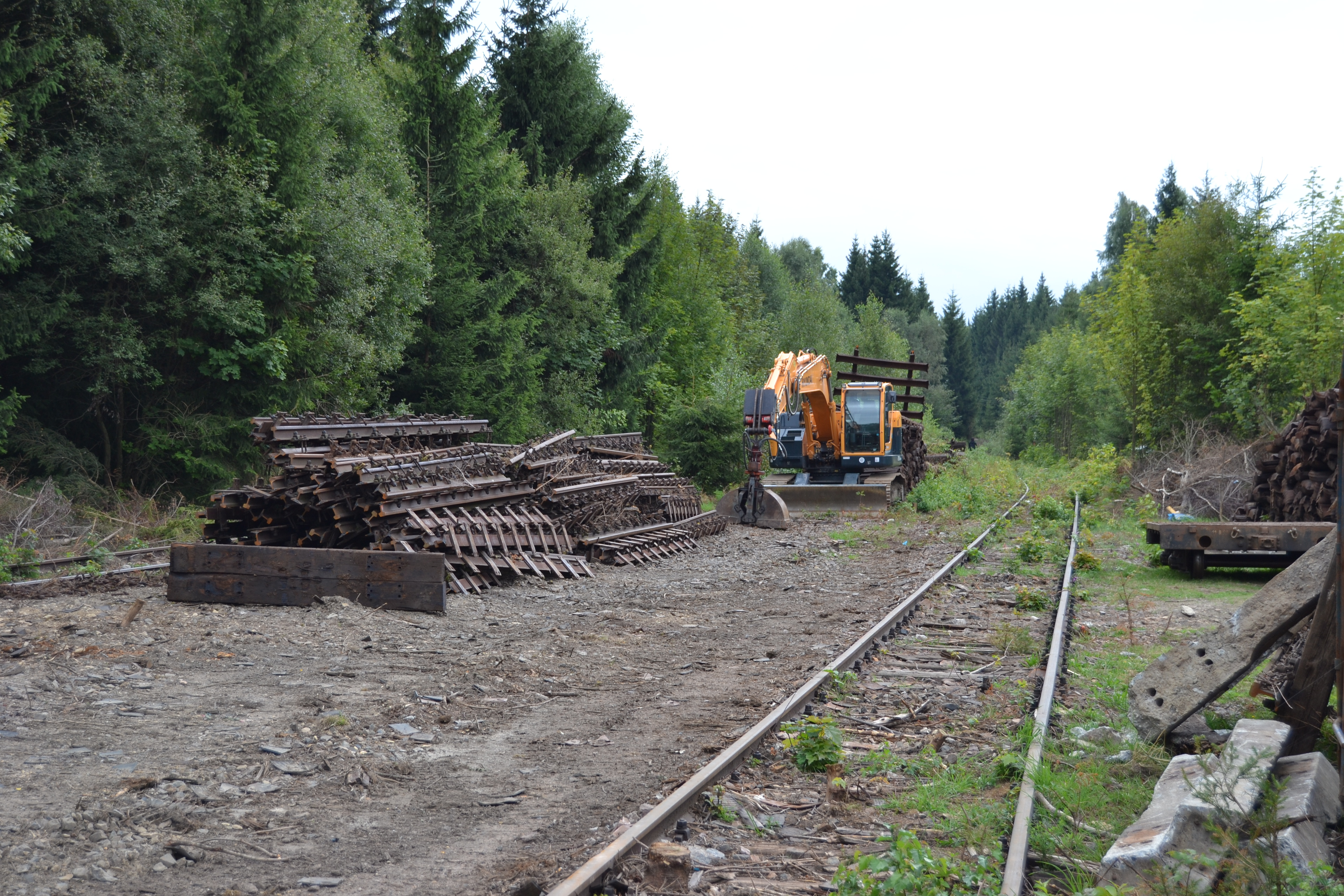 Rückbau der Gleis- und bahntechnischen Anlagen im Bereich des Bahnhofs Gelobtland des stillgelegten Teilabschnittes der Bahnstrecke Reitzenhain–Flöha. Blick Richtung Reitzenhain